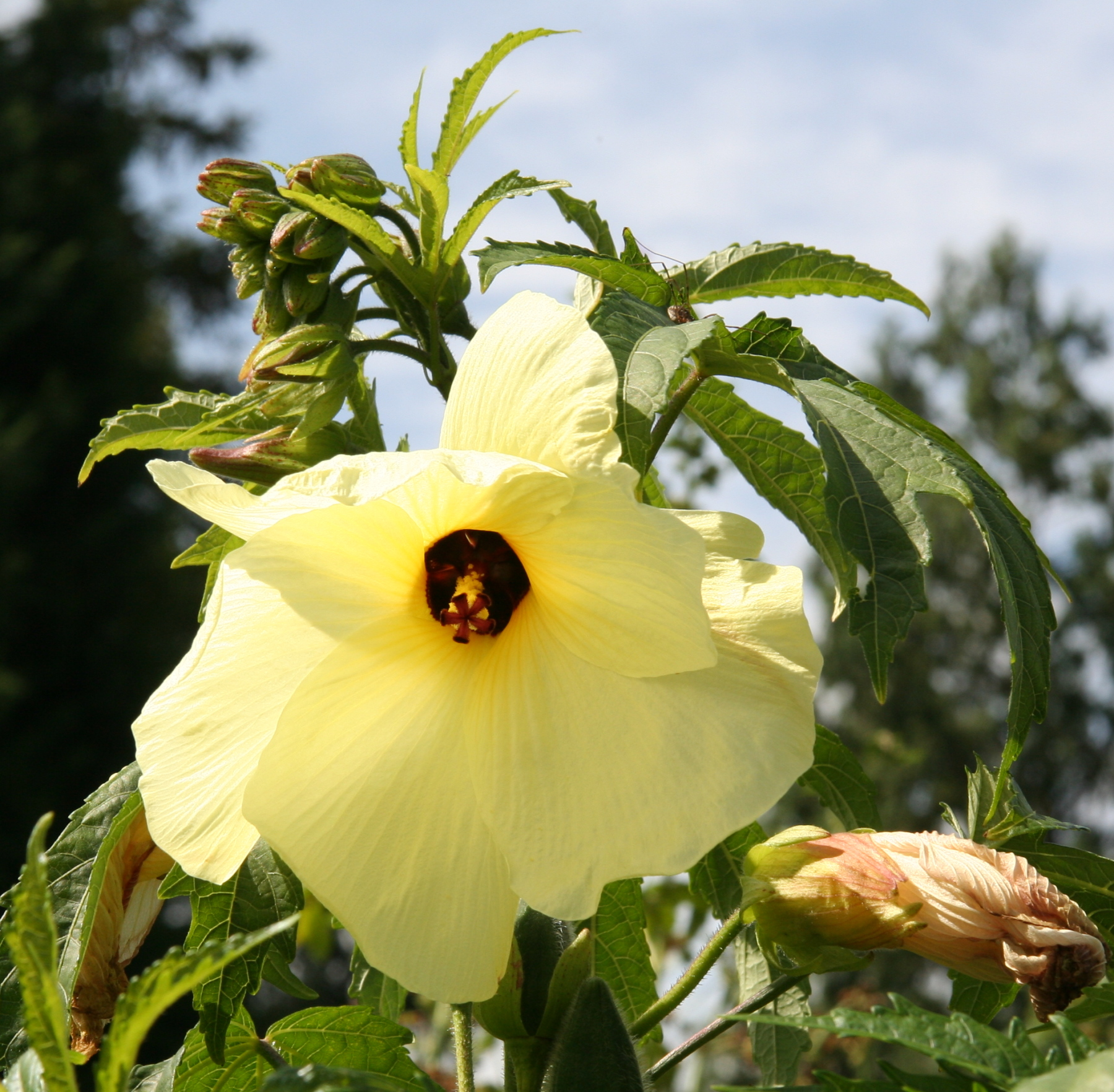 Abelmoschus manihot im Botanischen Garten Dresden